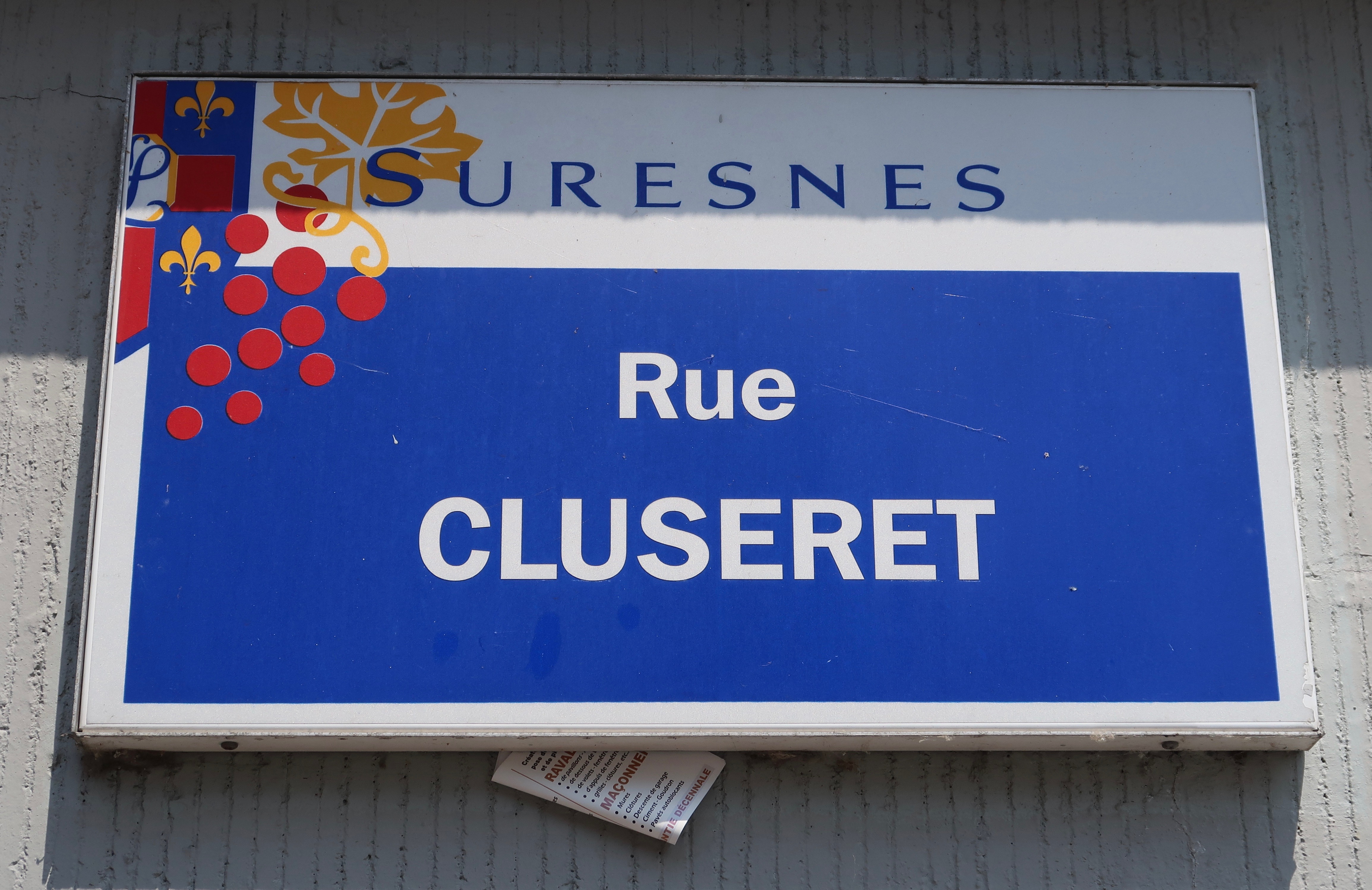 Plaque de la rue Cluseret à Suresnes (Hauts-de-Seine).